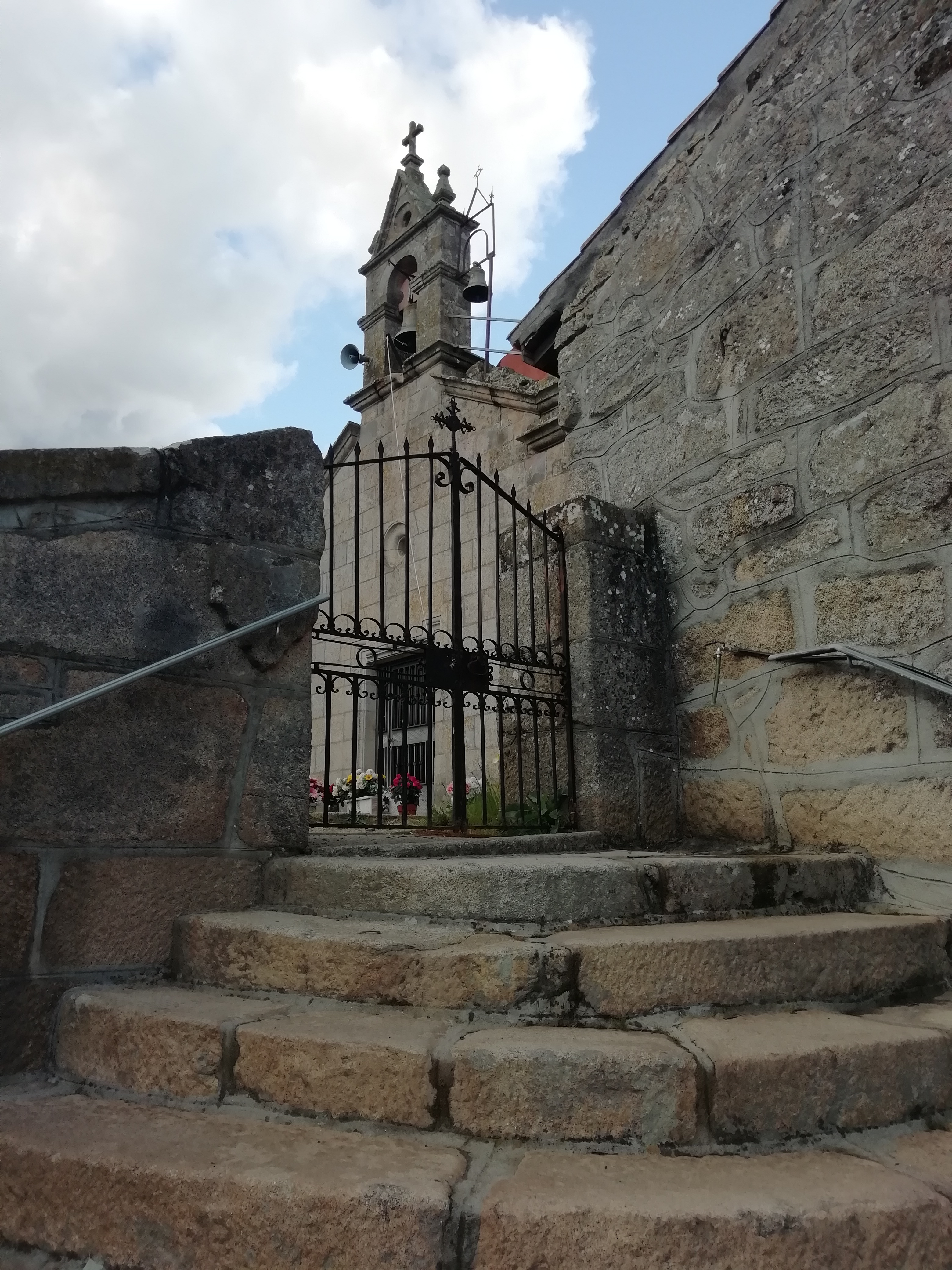 Igrexa